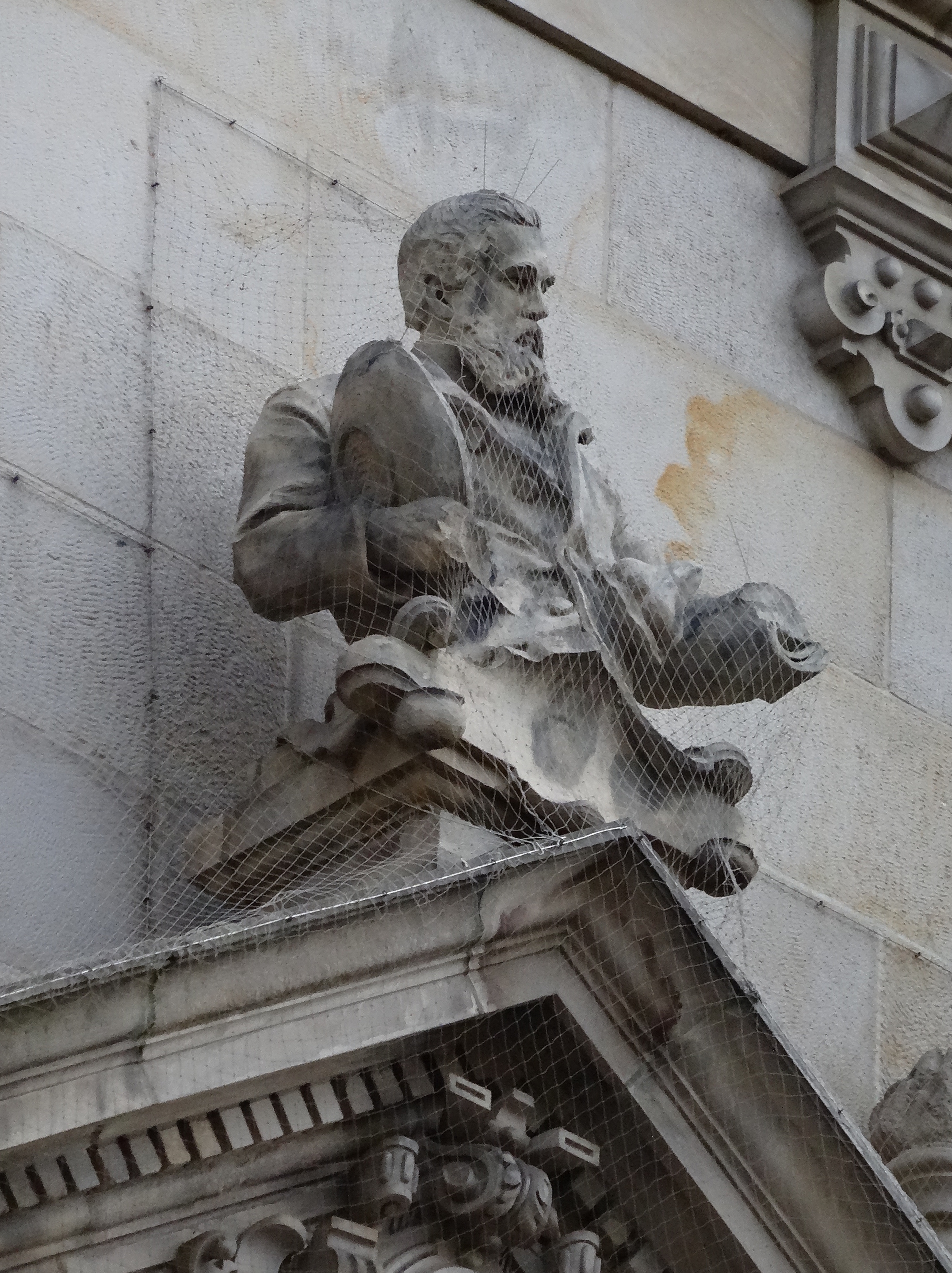 Der Gelehrte Prof. Justus Brinckmann mit Sammlungsstücken für das Museum